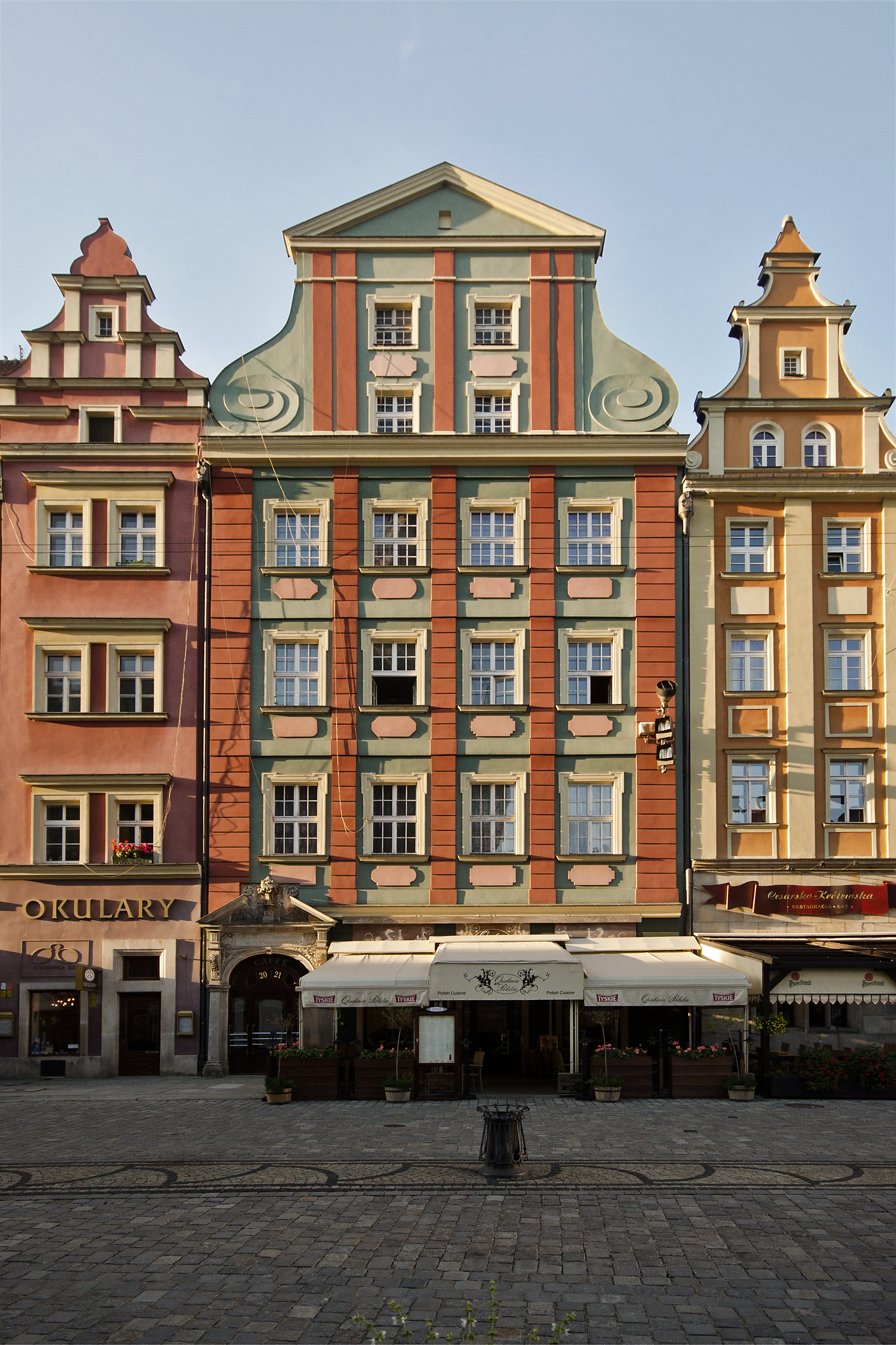 Kamienice Rynek 20, 21,Wrocław - Stare Miasto